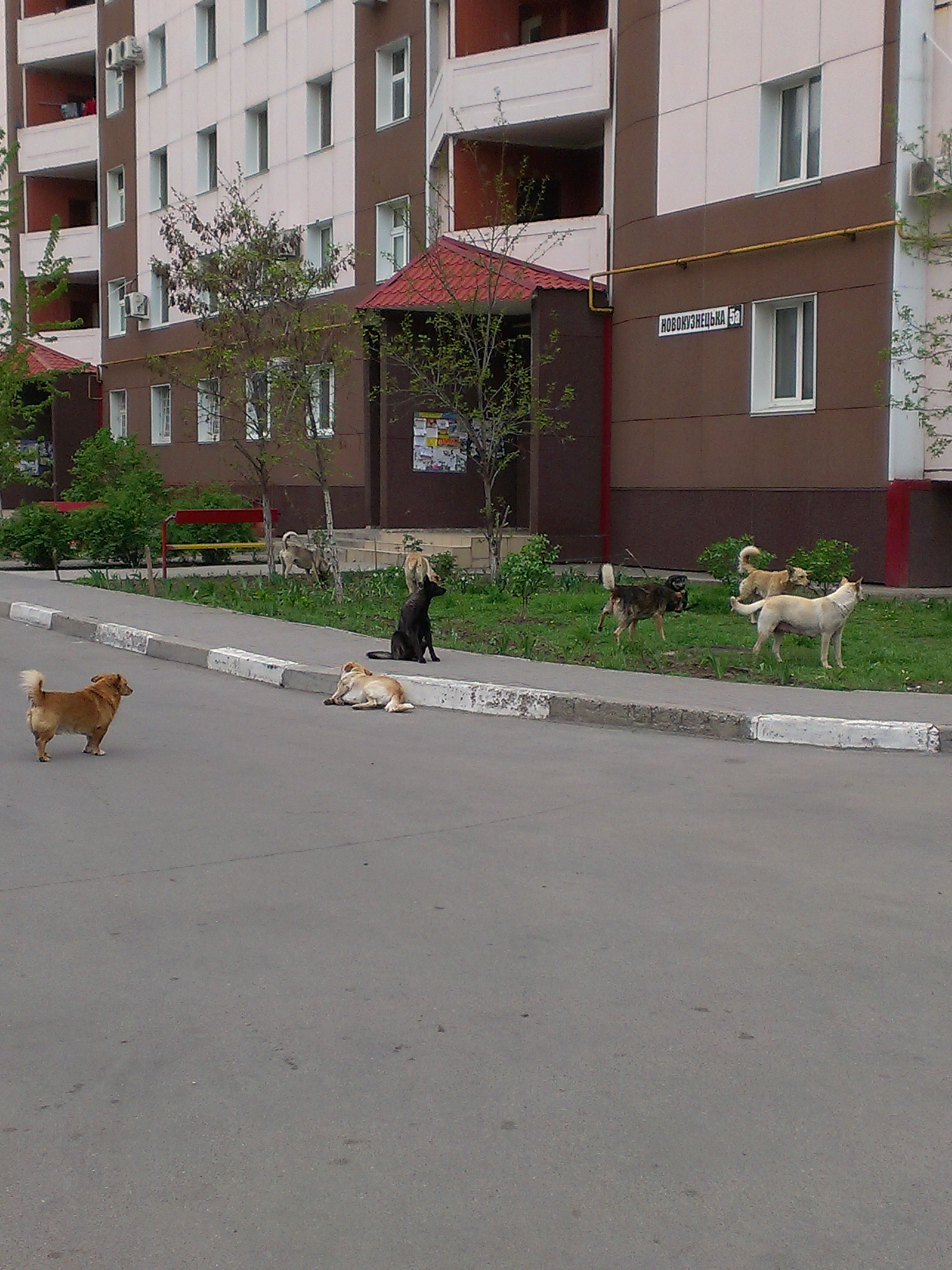 Бездомные собаки Южного микрорайона